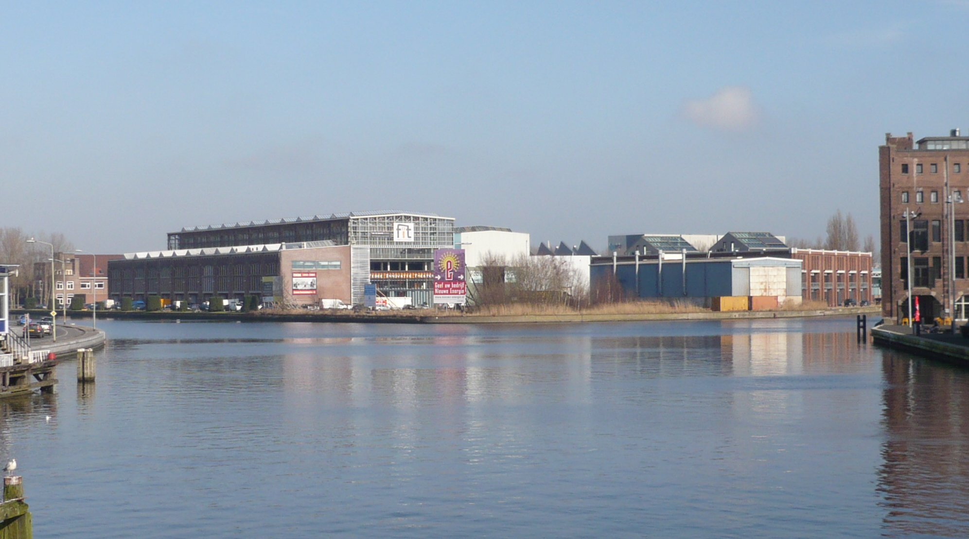 Spaarne river. View north from bridge - left Havenkantoor, middle - Figee, right Droste